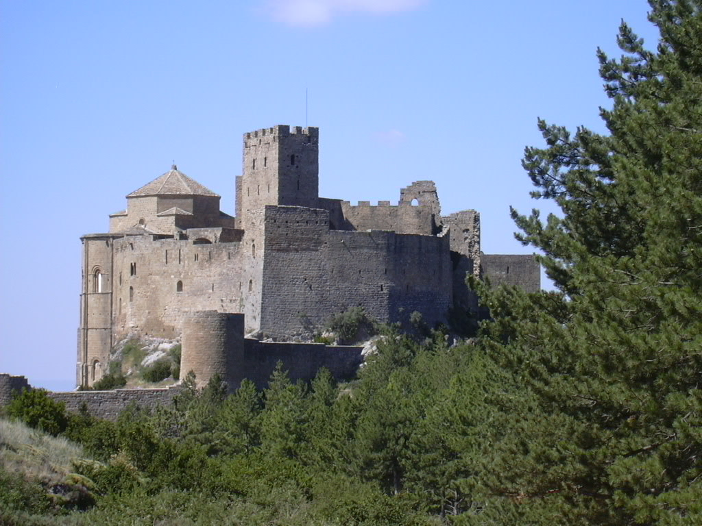 Vista del Castillo de Loarre. Este castillo románico, amurallado con torreones, está en la sierra de Loarre, en la provincia de Huesca (España) (a unos 35 kilómetros de la capital provincial). Fue construido en el siglo XI por orden del rey Sancho III de Navarra sobre un promontorio de roca caliza. Está considerado como la fortaleza románica mejor conservada de Europa.